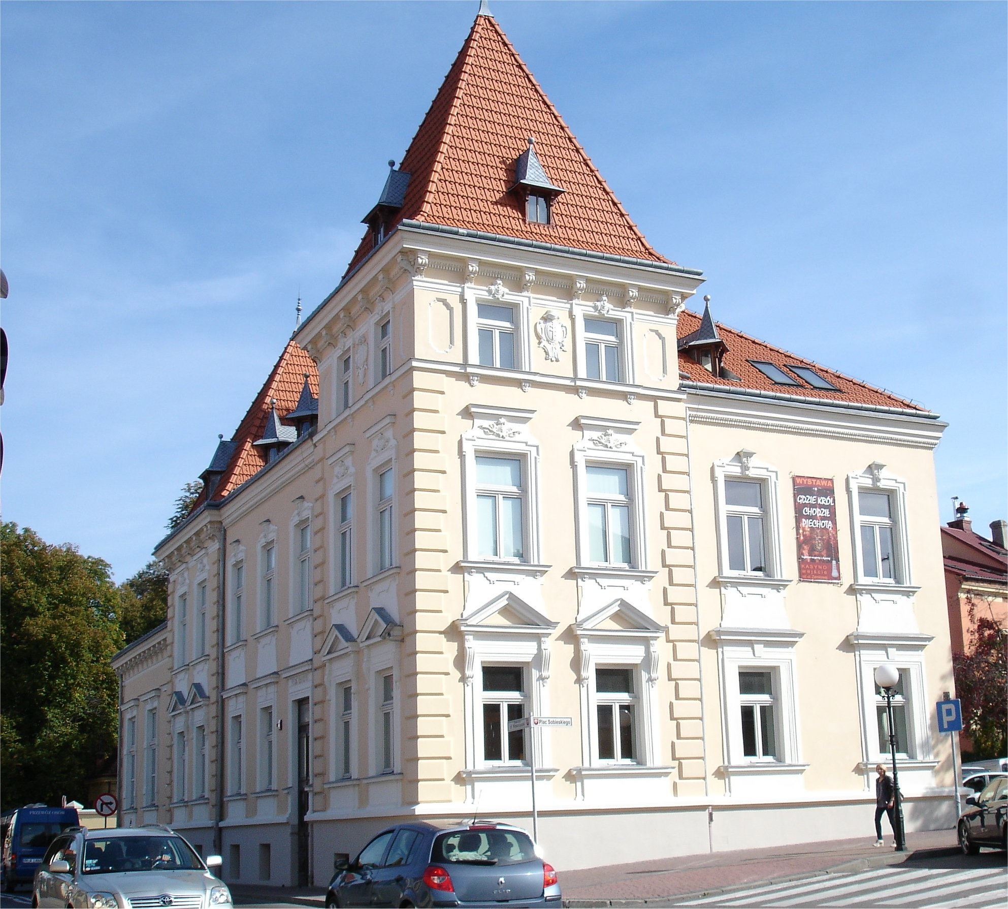 kasyno oficerskie Stan z września 2012 roku Łańcut, ul. Kościuszki 2, Łańcut 11.1978.